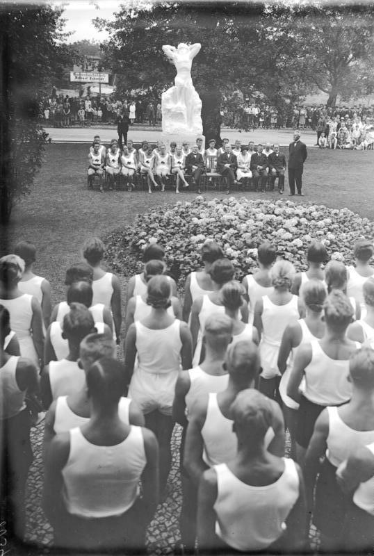 Die feierliche Enthüllung des Jahn-Denkmals vor der Preussischen Hochschule für Leibesübungen in Spandau bei Berlin! Anwesend waren der preussische Kulturminister Dr. Becker und als Vertreter der Reichswehr Generalleutnant Hasse. Der Direktor der Preussischen Hochschule für Leibesübungen Neuendorf hält nach der Enthüllung des Jahn-Denkmals die Festrede. Das Jahn-Denkmal ist eine Stiftung des verstorbenen Prof. Ernst Wenck und soll die äussere und innere Befreiung des Menschen symbolisieren.